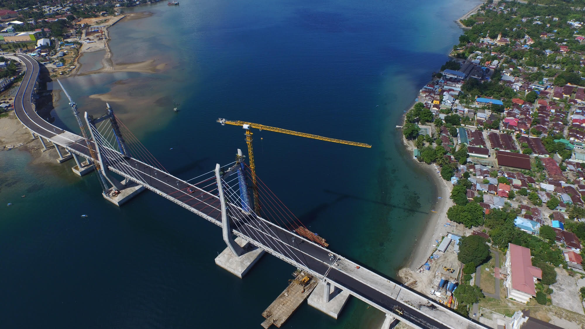 Jembatan Merah Putih yang membelah Teluk Ambon dan menghubungkan kedua sisi Kota Ambon.